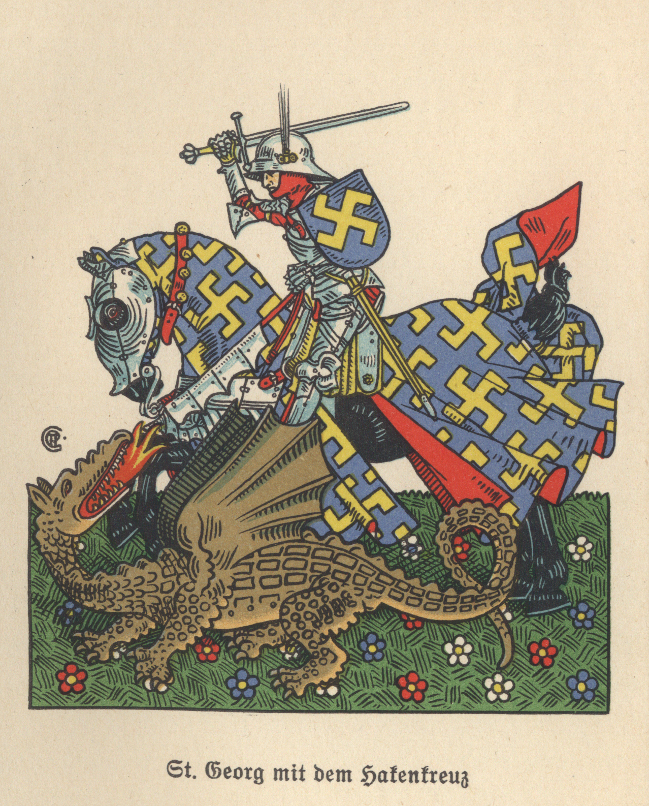 St. Georg mit dem Hakenkreuz